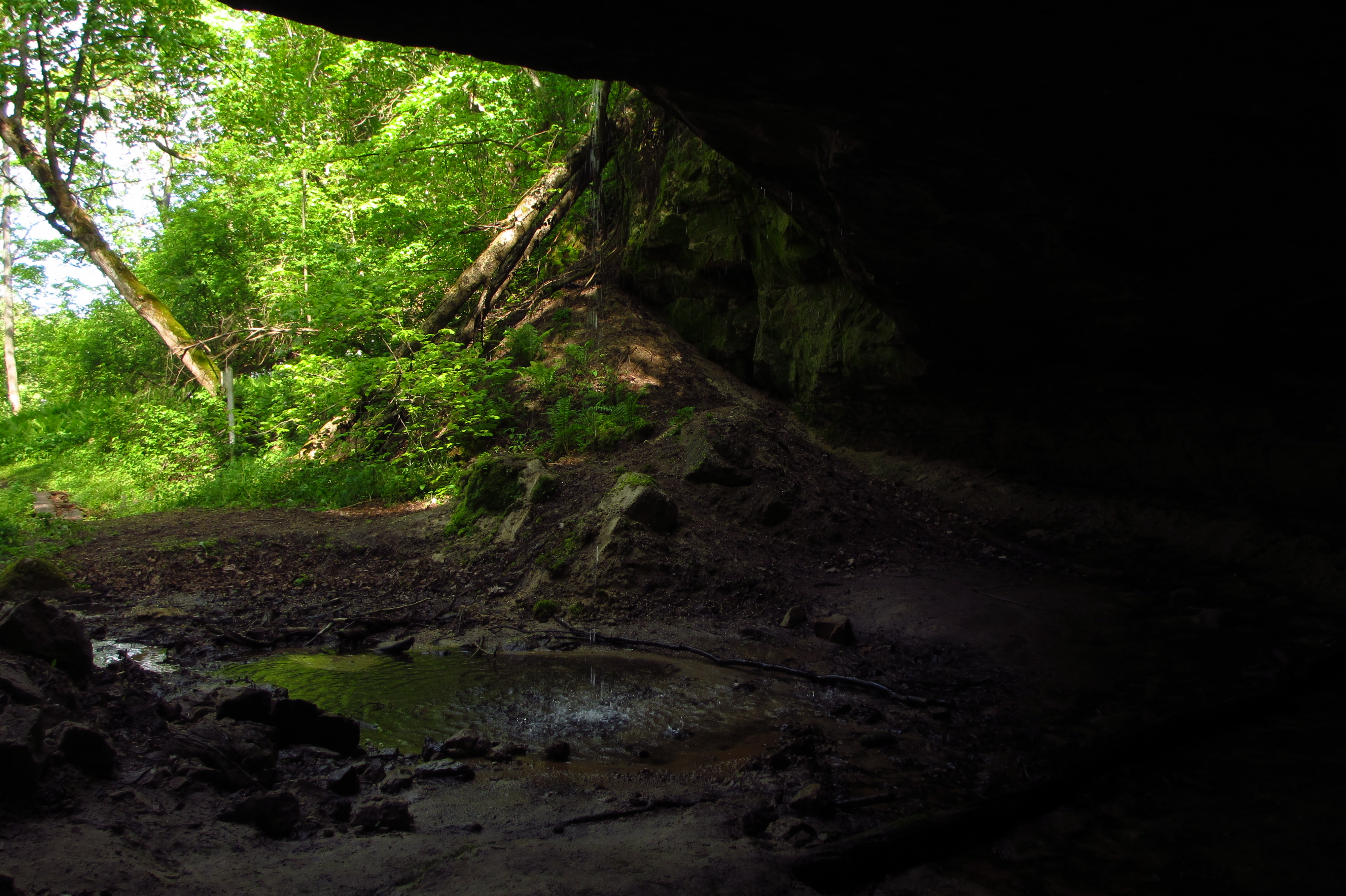 Turje kelder Lahemaa rahvuspargis